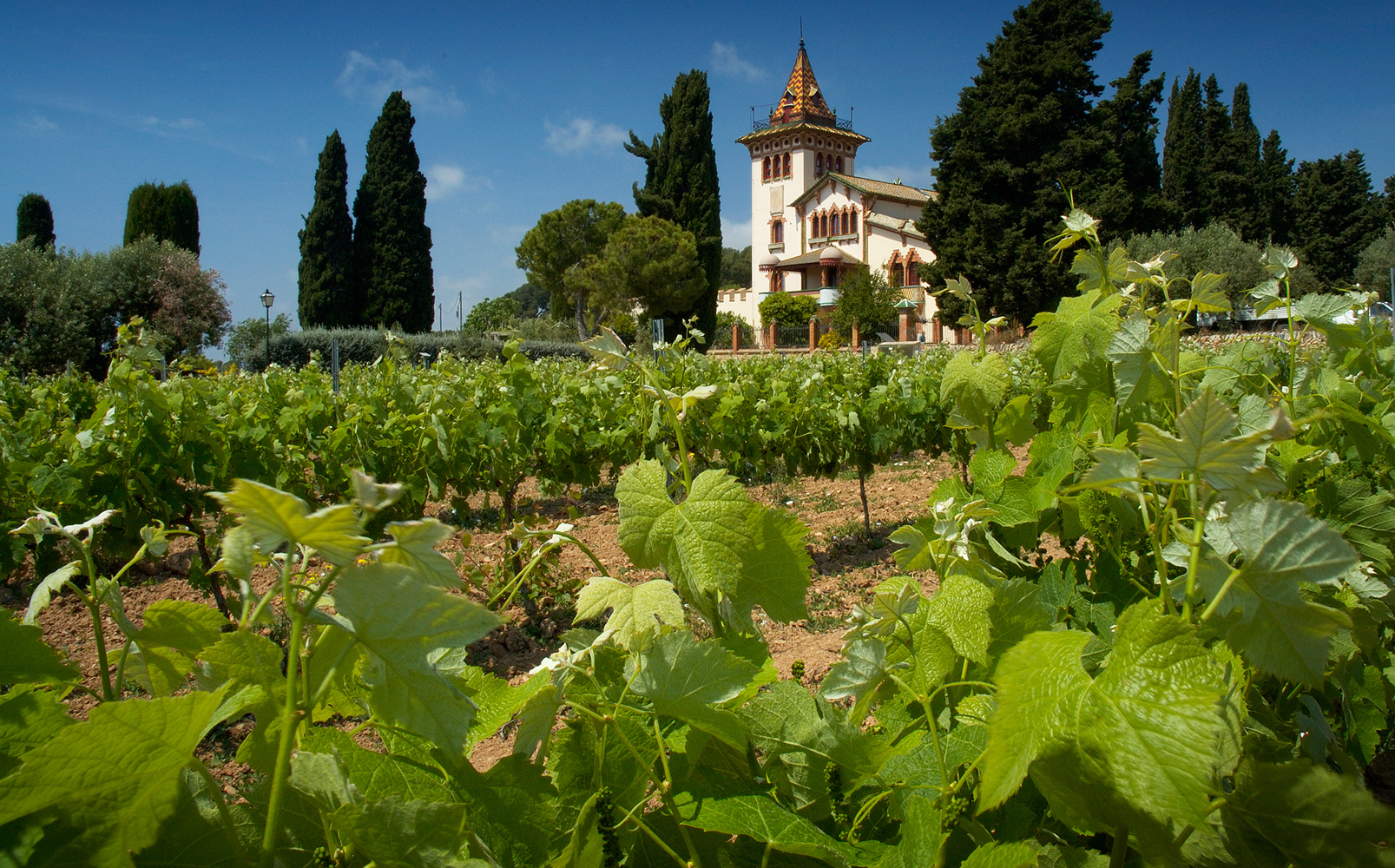 Tempranillo vines, Clos la Plana vinyard, Penedes region, Spain 2006